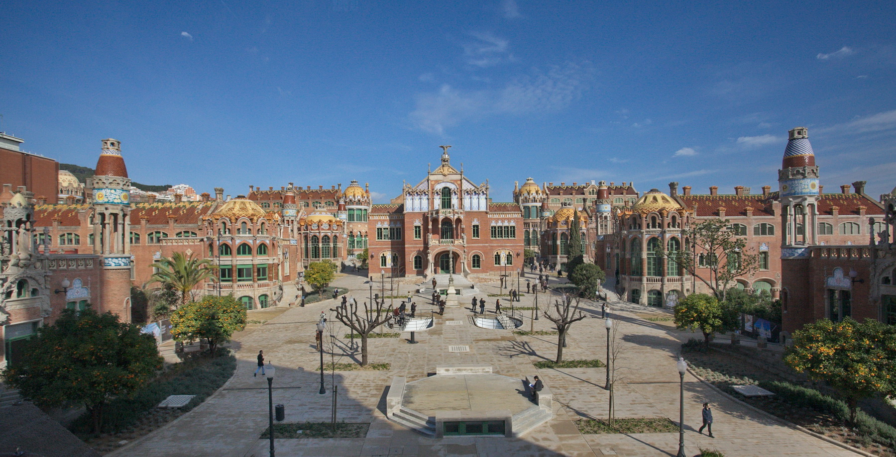 Àrea central rodejada de tots els pavellons modernistes de Domènech i Montaner, després de la restauració de 2013.